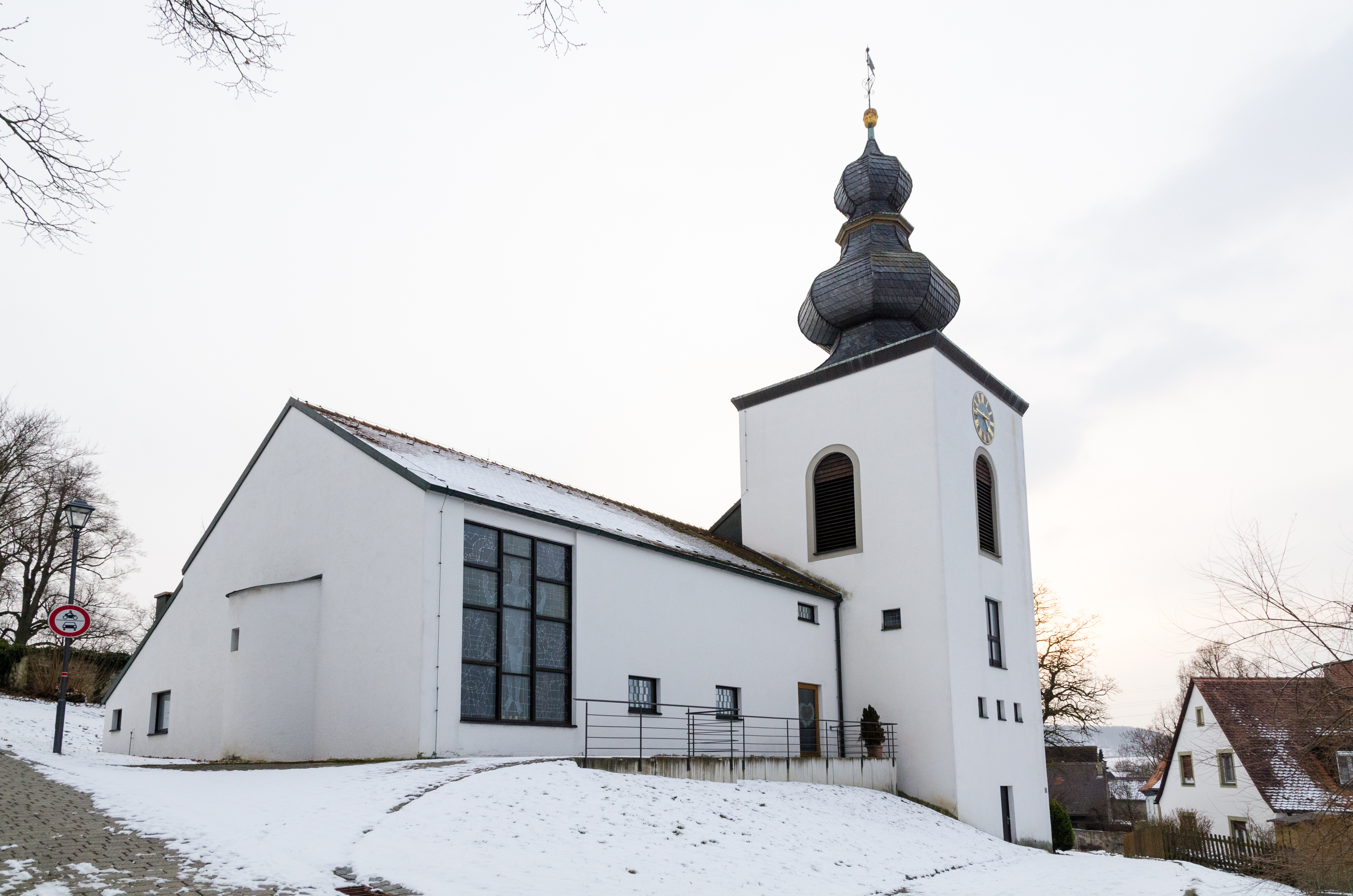 Langenfeld, Evangelische Jesus-Christus-Kirche